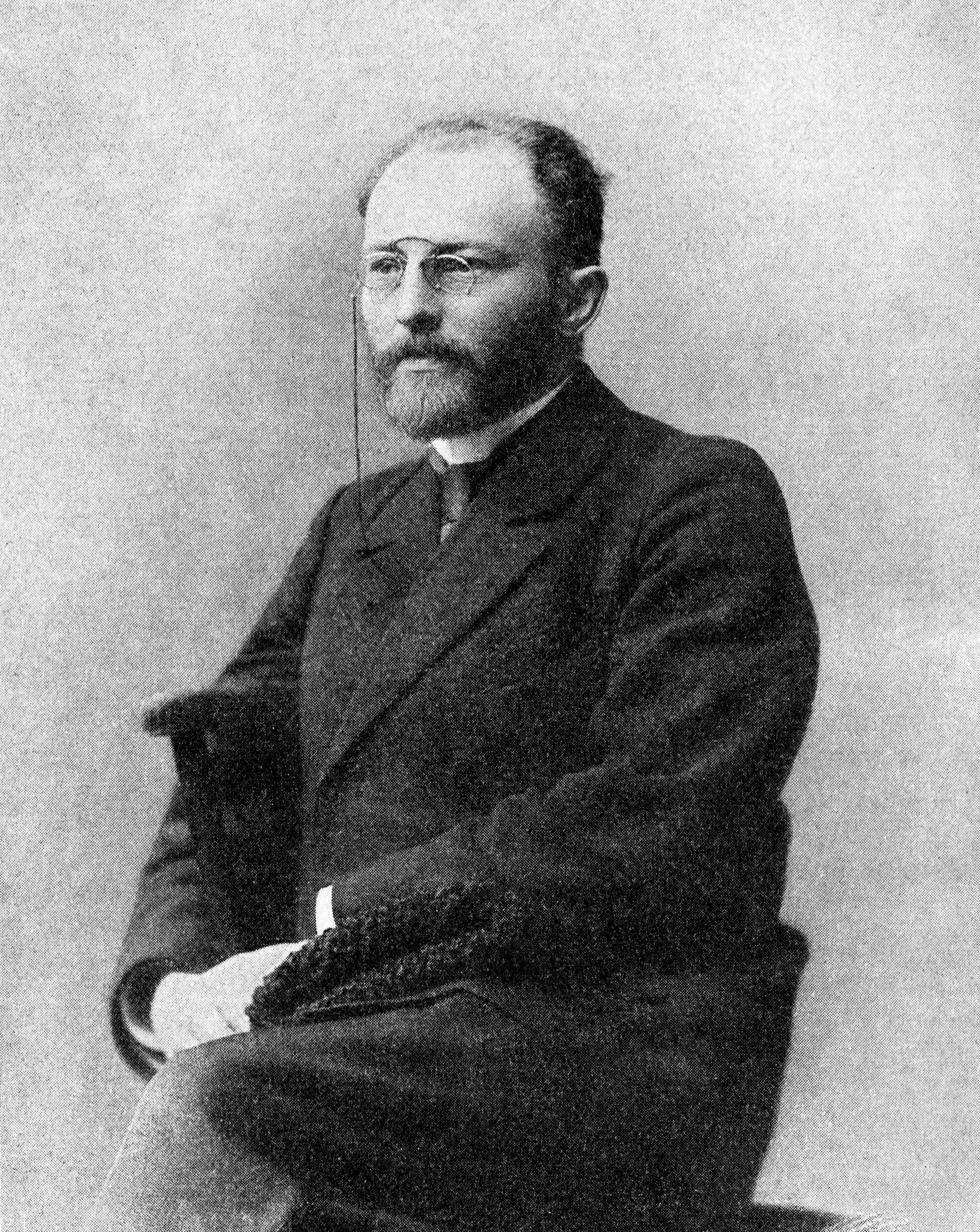 Vikenty Veresaev